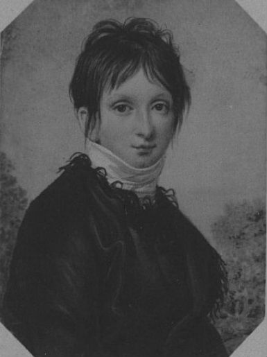 Каверина Анна Петровна, ур. Корсакова (177. —1808)